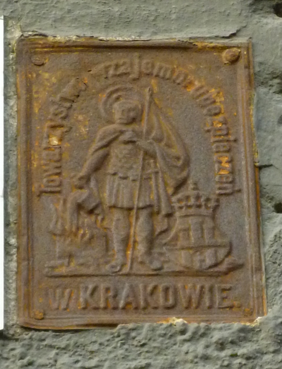 Tabliczka na budynku który był ubezpieczony w Towarzystwie Ubezpieczeń Wzajemnych w Krakowie